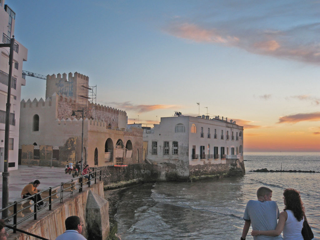 Castillo de Chipiona (Cádiz) / Castle of Chipiona